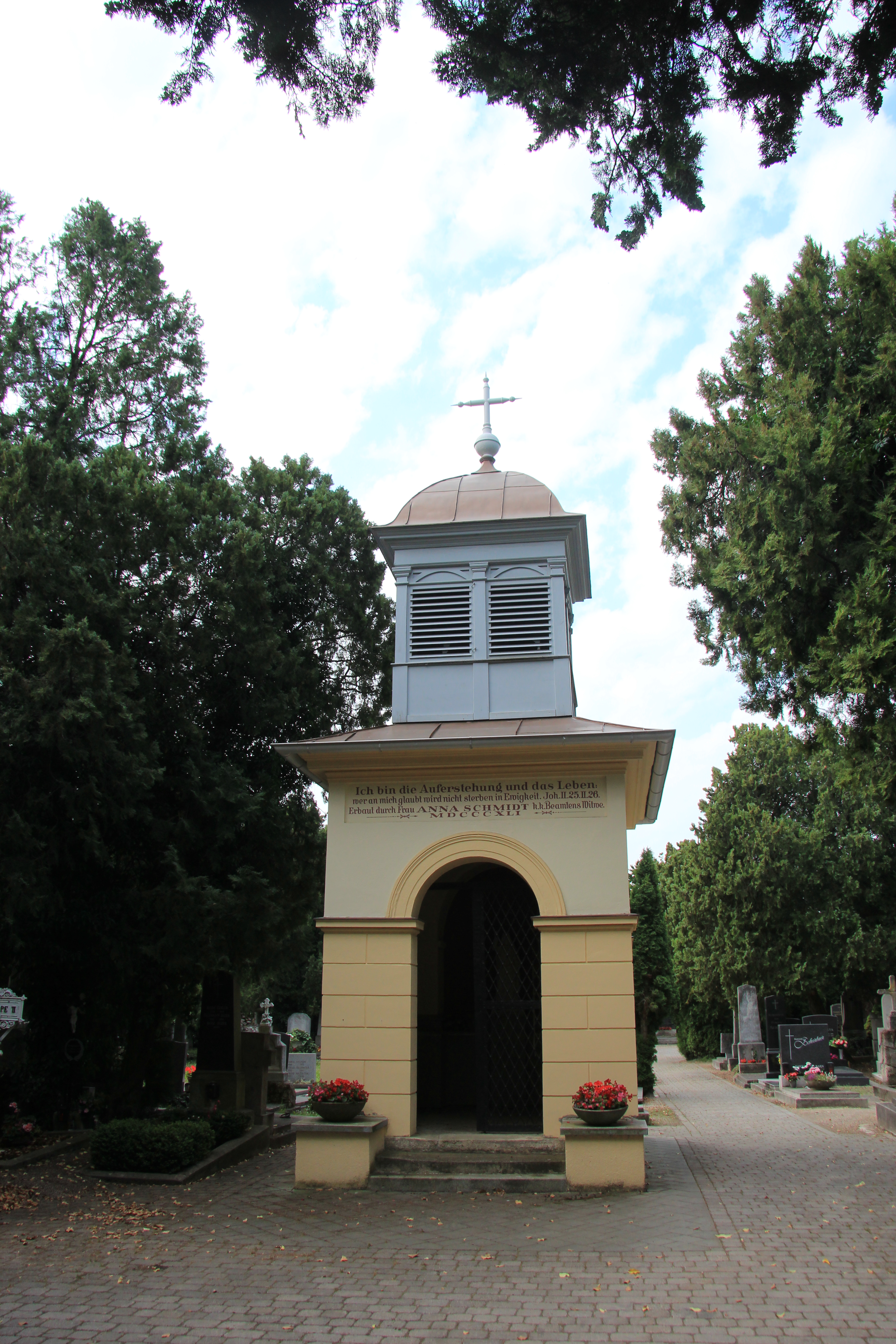 Stadtpfarrfriedhof Baden